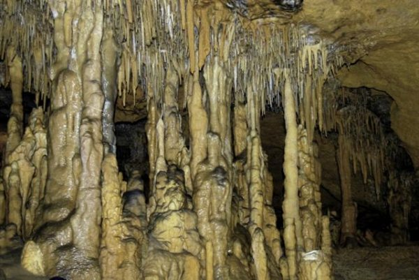 Barca de Benifallet